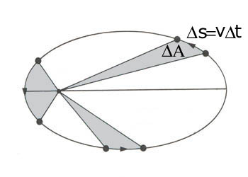 II Prawo Kepplera